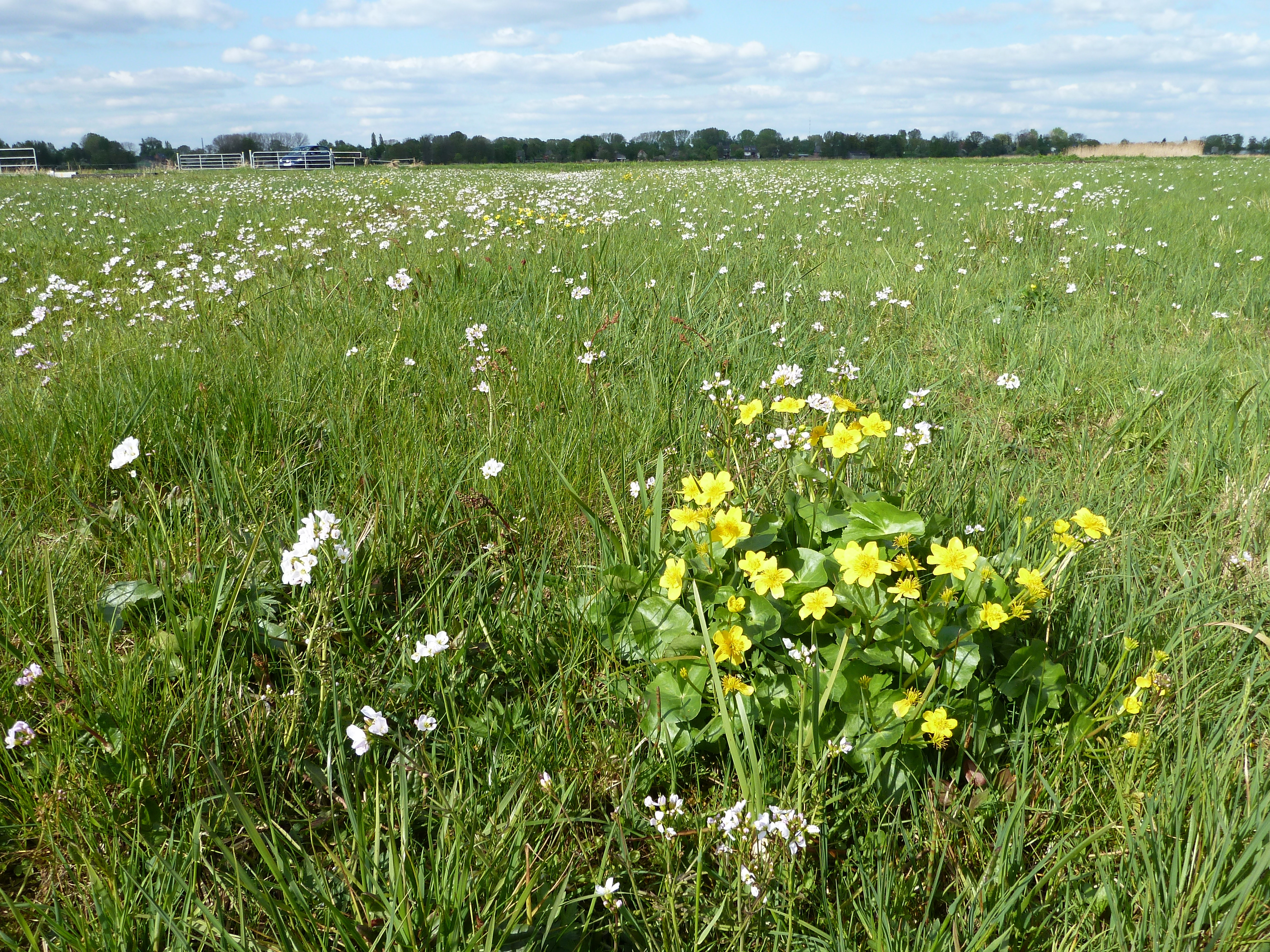 Feuchtgrünland mit Sumpfdotterblume und Wiesenschaumkraut auf einem Moorstandort in Hamburg Neuland